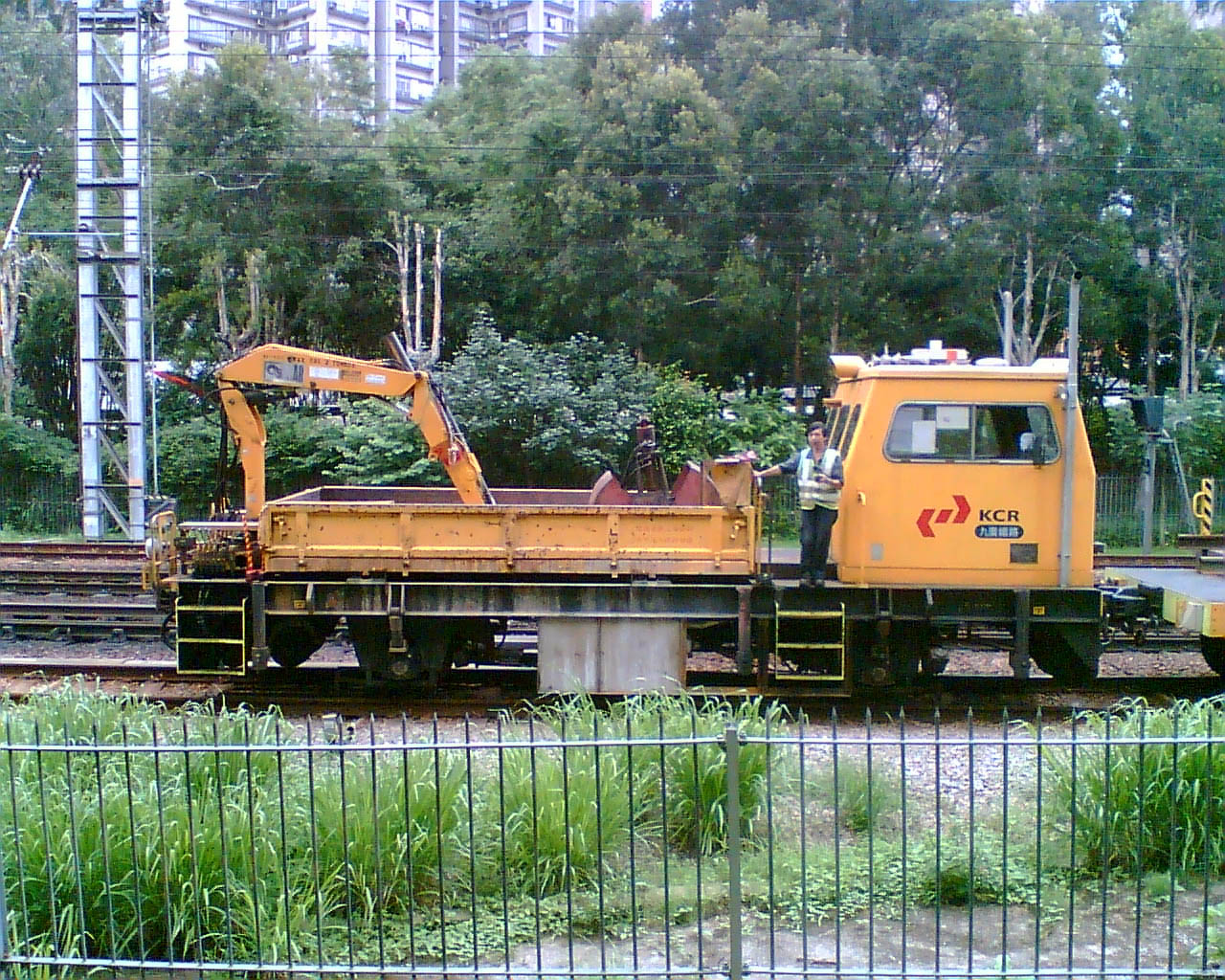 九廣鐵路工程車